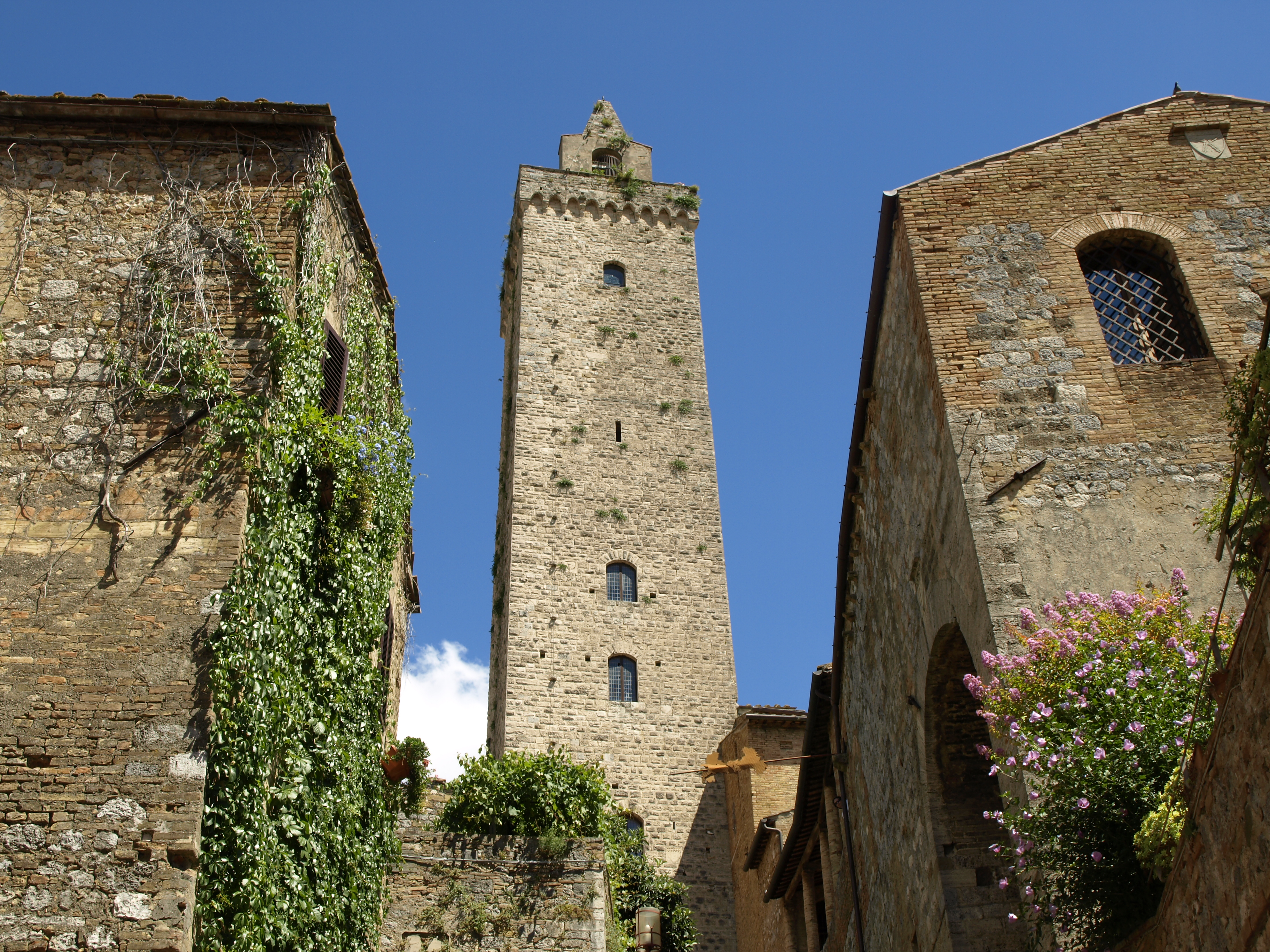 Torre Grossa, San Gimignano, Italia.